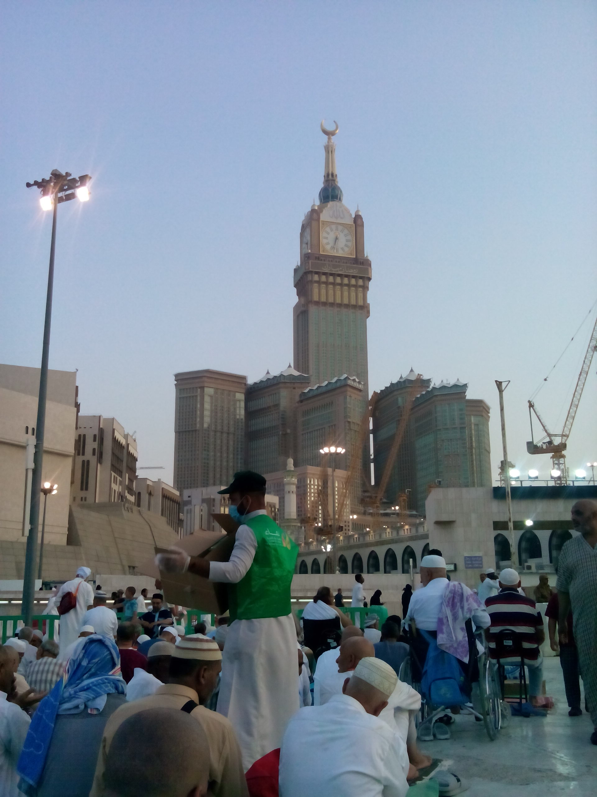 مبنى برج الساعة الذي يطل على الكعبة في مدينة مكة